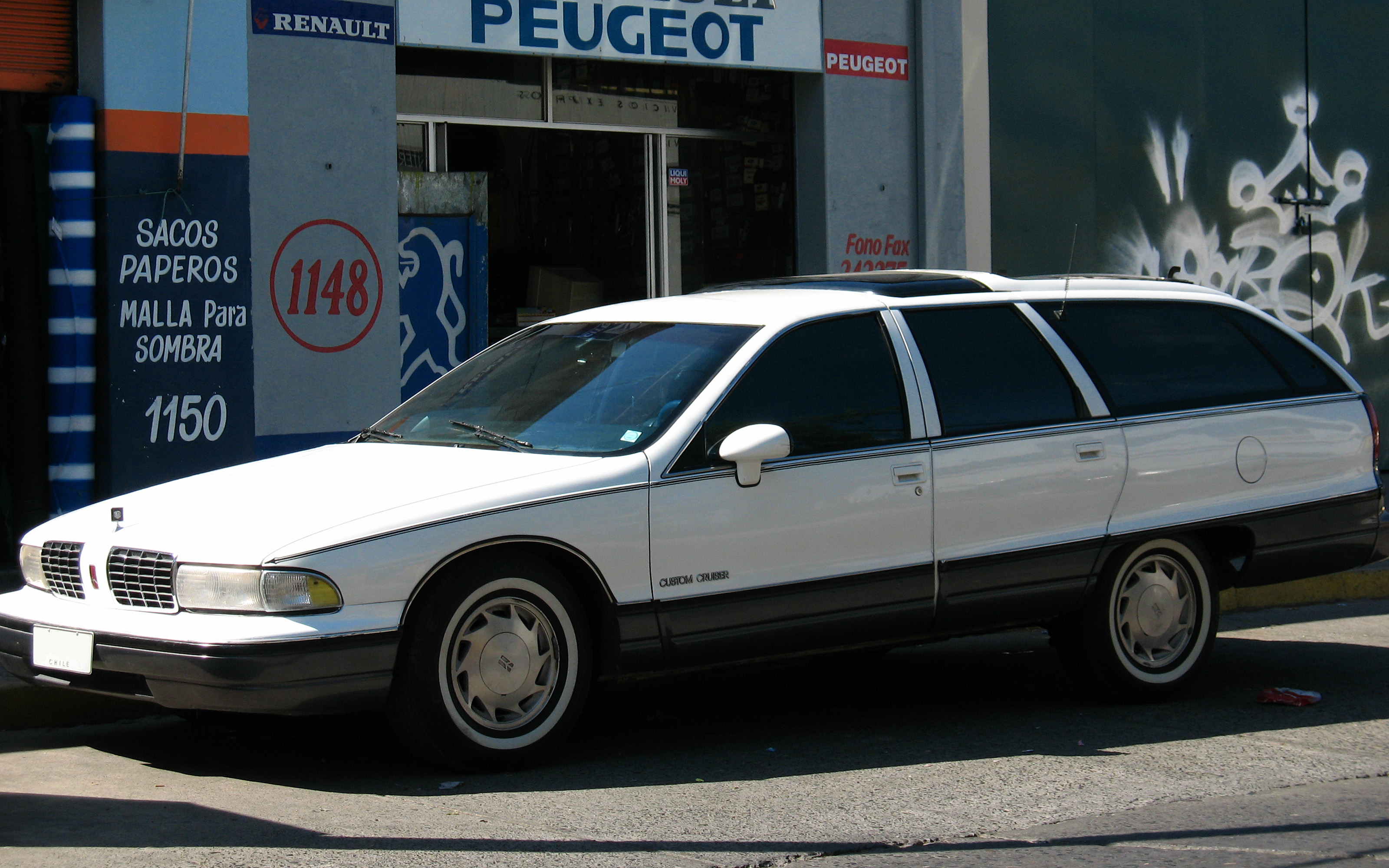 Oldsmobile Custom Cruiser 1991